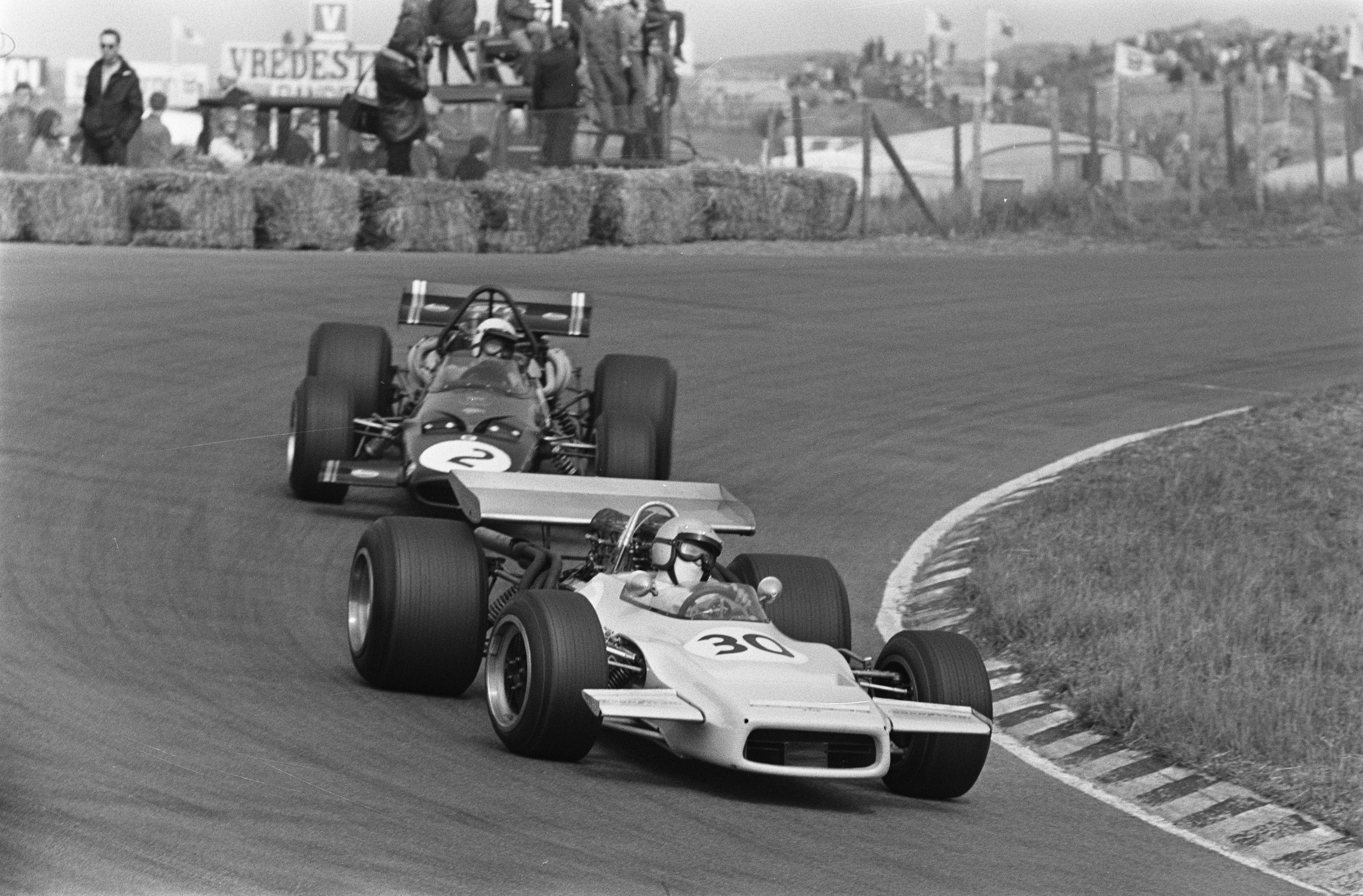 Collectie / Archief : Fotocollectie Anefo Reportage / Serie : Formule 5000-races 1970 te Zandvoort Beschrijving : Wedstrijdmoment Datum : 19 april 1970 Locatie : Noord-Holland, Zandvoort Trefwoorden : autoraces, circuits, coureurs, raceauto's Fotograaf : Fotograaf Onbekend / Anefo Auteursrechthebbende : Nationaal Archief Materiaalsoort : Negatief (zwart/wit) Nummer archiefinventaris : bekijk toegang 2.24.01.05 Bestanddeelnummer : 923-4535